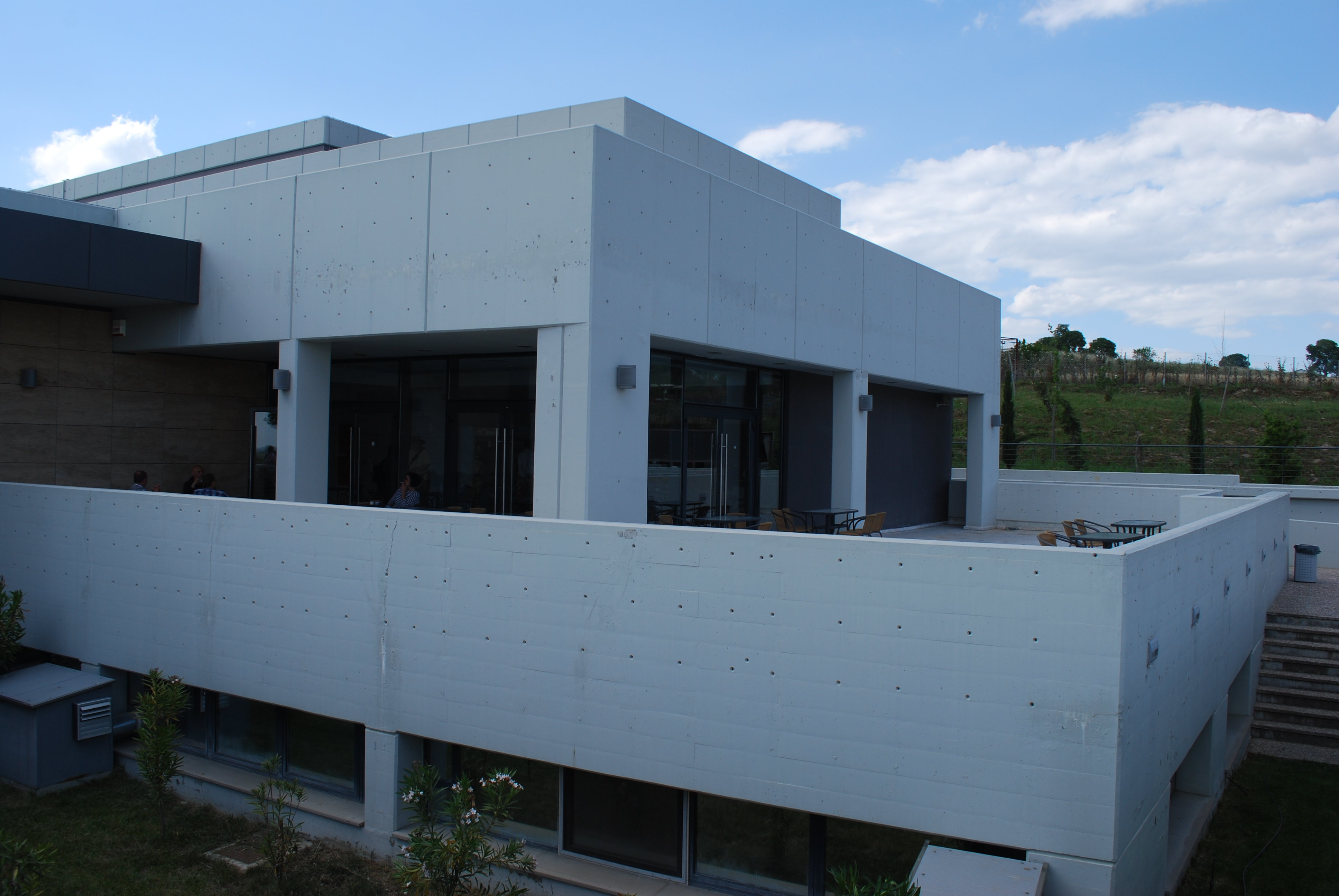 Vue du musée archéologique de Pella, en Macédoine (Grèce).